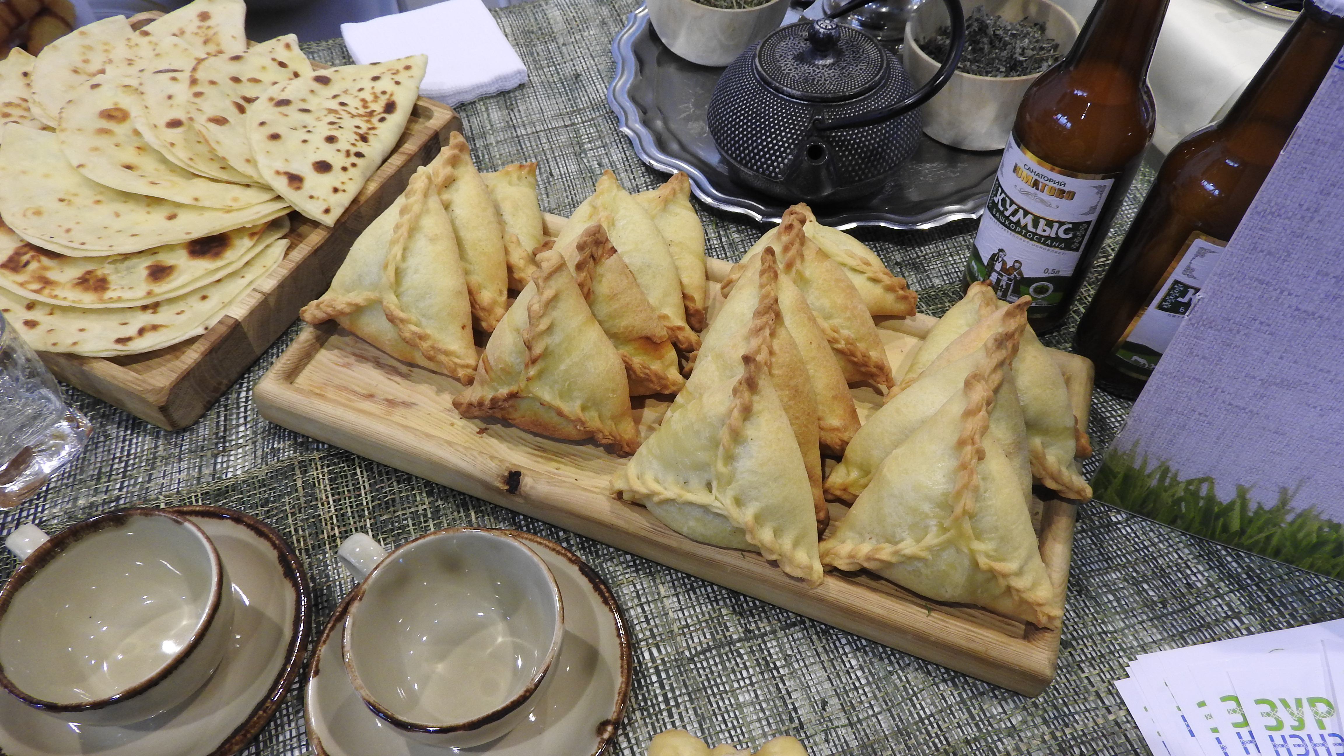 Выставка в Уфе "УФА-ЛАДЬЯ. АРТ.РЕМЕСЛА. СУВЕНИРЫ".